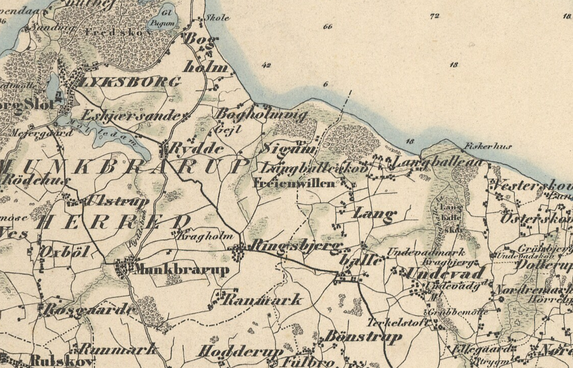 Udsnit med Sigum og omegn, fra: Videnskabernes Selskabs Kaart over Slesvigs Fastland og Als 4, østre blad